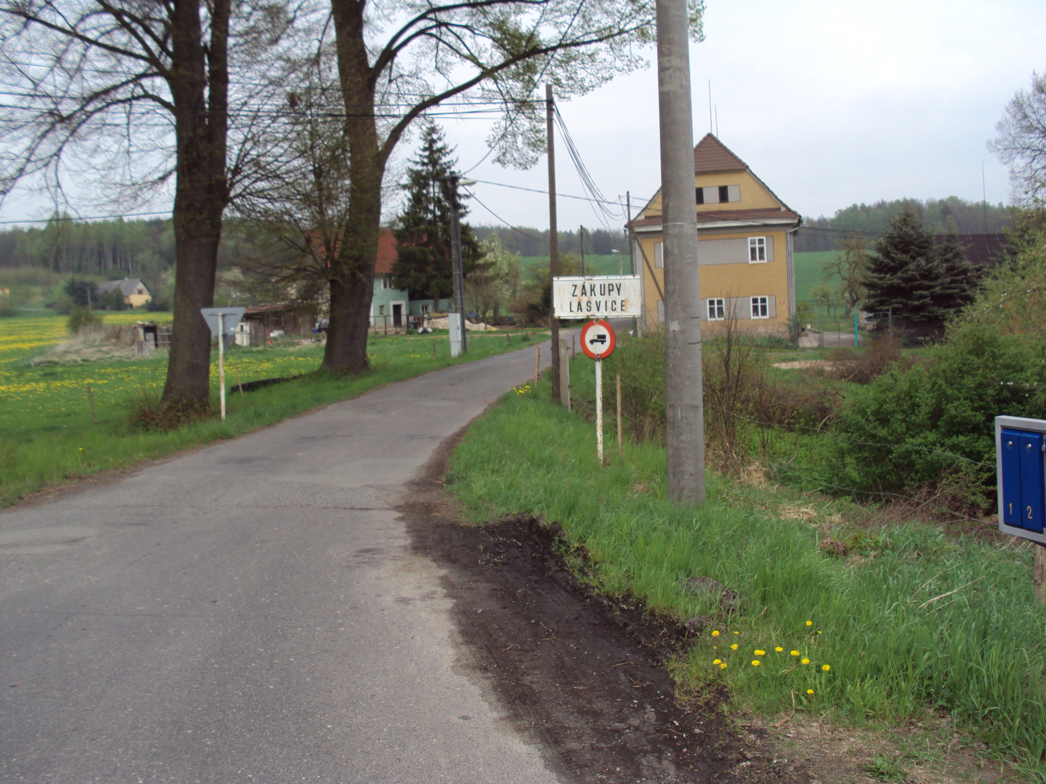 Počátek vesnice Lasvice u Zákup